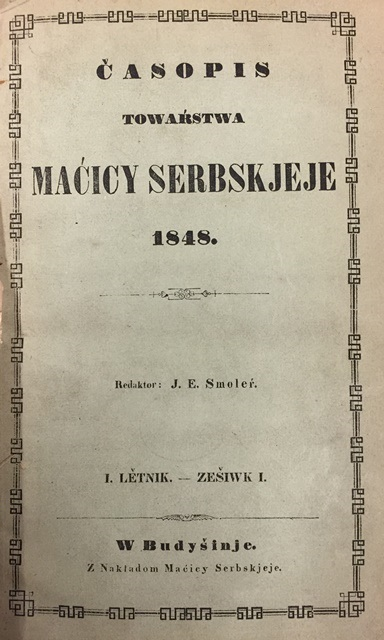 Первый номер лужицкого журнала Матицы серболужицкой за 1848 год (Баутцен)